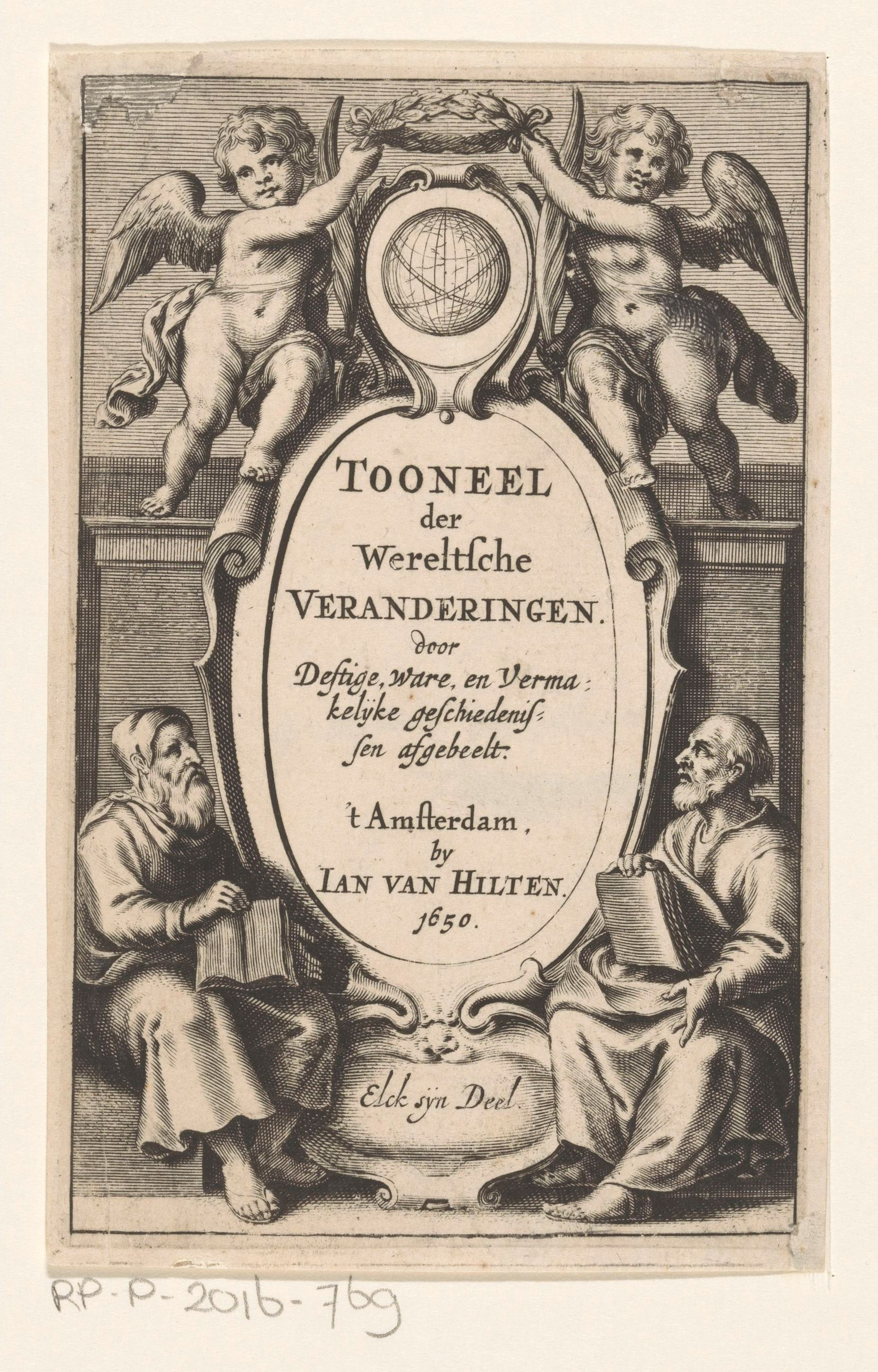 IdentificatieTitel(s): Zittende mannen en puttiTitelpagina voor: J. Glazemaker, Tooneel der Wereltsche Veranderingen, 1650Objecttype: prent titelpagina Objectnummer: RP-P-2016-769Omschrijving: Twee mannen met boeken zitten aan weerszijden van een cartouche met de titel van het boek. Daarboven twee putti met een lauwerkrans boven een globe.VervaardigingVervaardiger: prentmaker: anoniemuitgever: Jan van Hilten (vermeld op object)Plaats vervaardiging: AmsterdamDatering: 1650Materiaal: papier Techniek: graveren (drukprocedé)Afmetingen: plaatrand: h 140 mm × b 88 mmToelichtingTitelpagina voor: Glazemaker, J. Tooneel der Wereltsche Veranderingen. Amsterdam: Hilten, Jan van, 1650.OnderwerpWat: sitting figurecupids: 'amores', 'amoretti', 'putti'Verwerving en rechtenVerwerving: onbekend 2016Copyright: Publiek domein